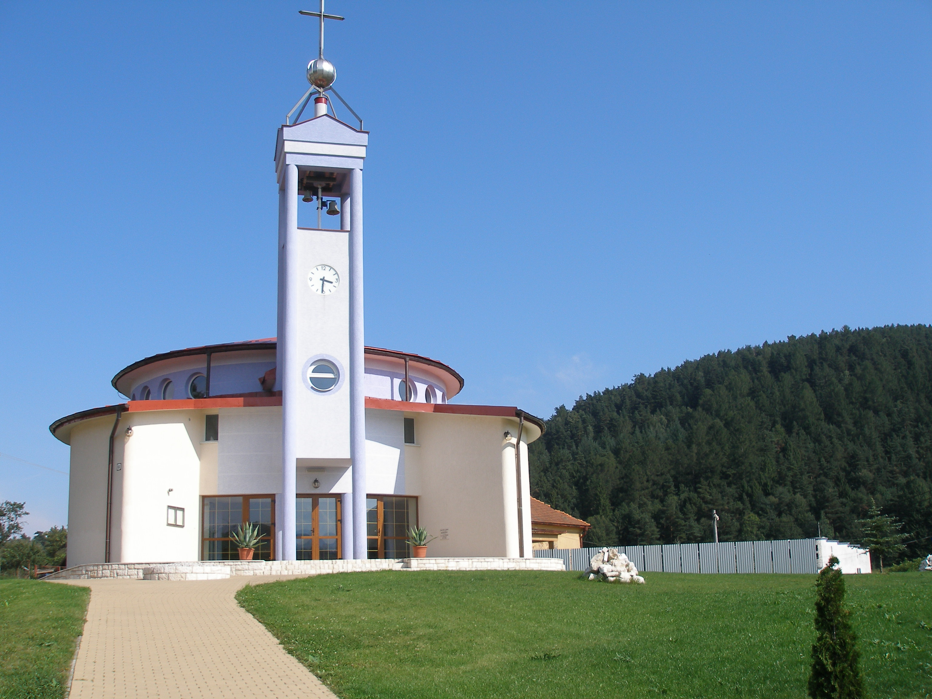 Obec Hendrichovce okr.Prešov, región Šariš